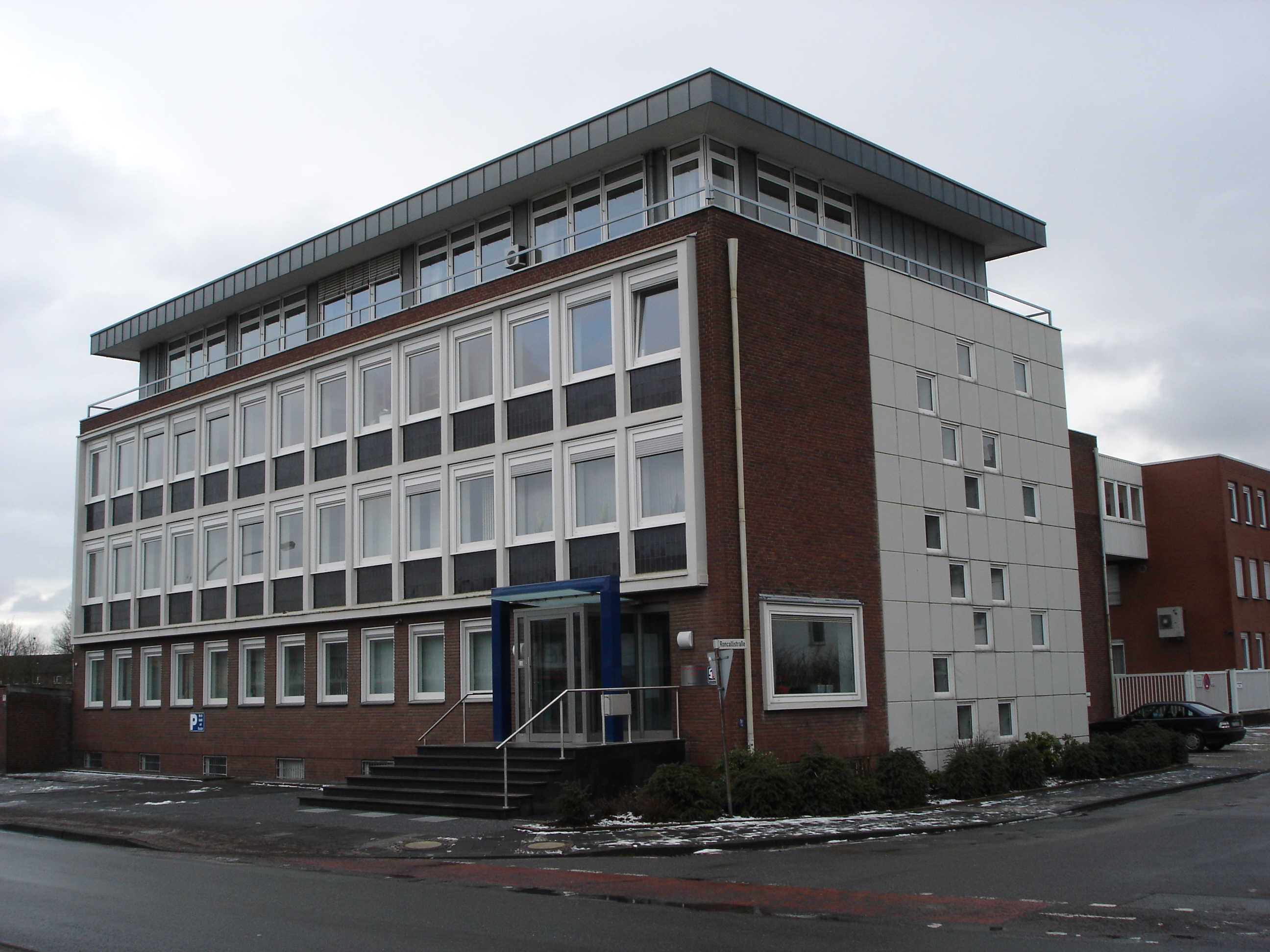 Firmensitz der Firma Schäfer in Ibbenbüren